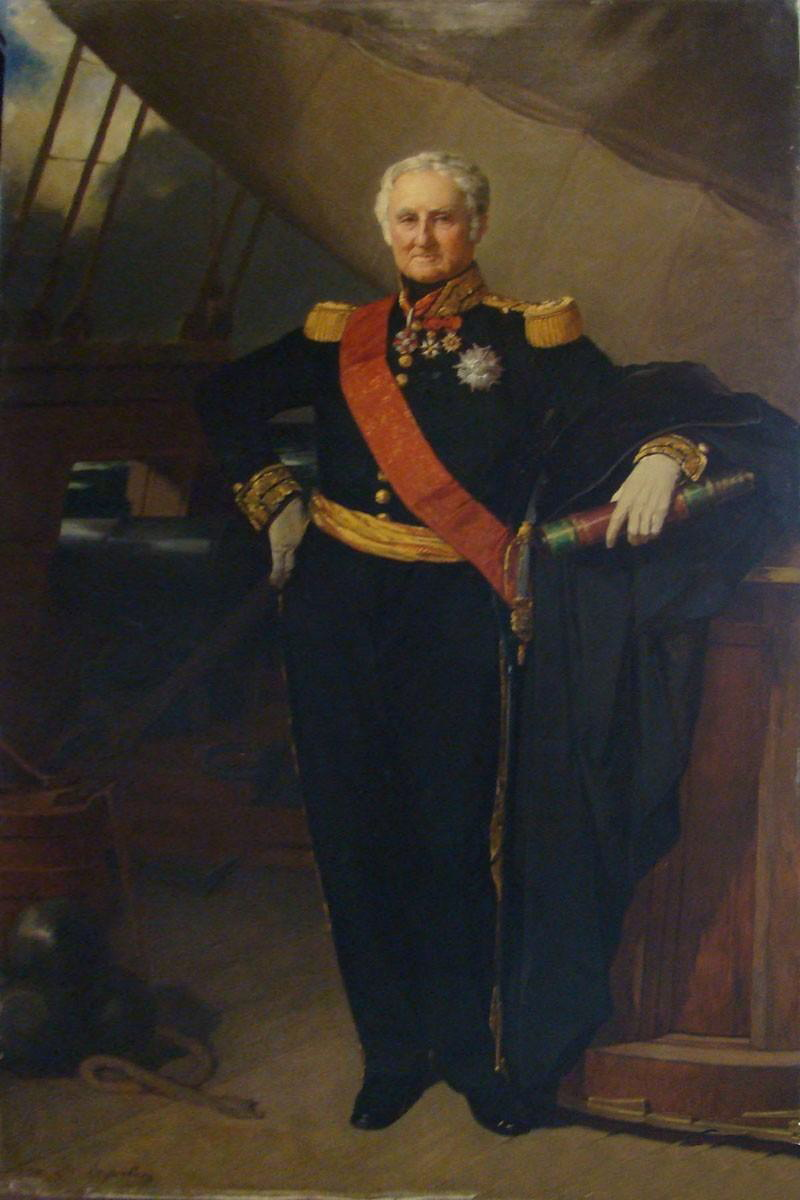 Jacques Bergeret (1771-1857), vice-amiral